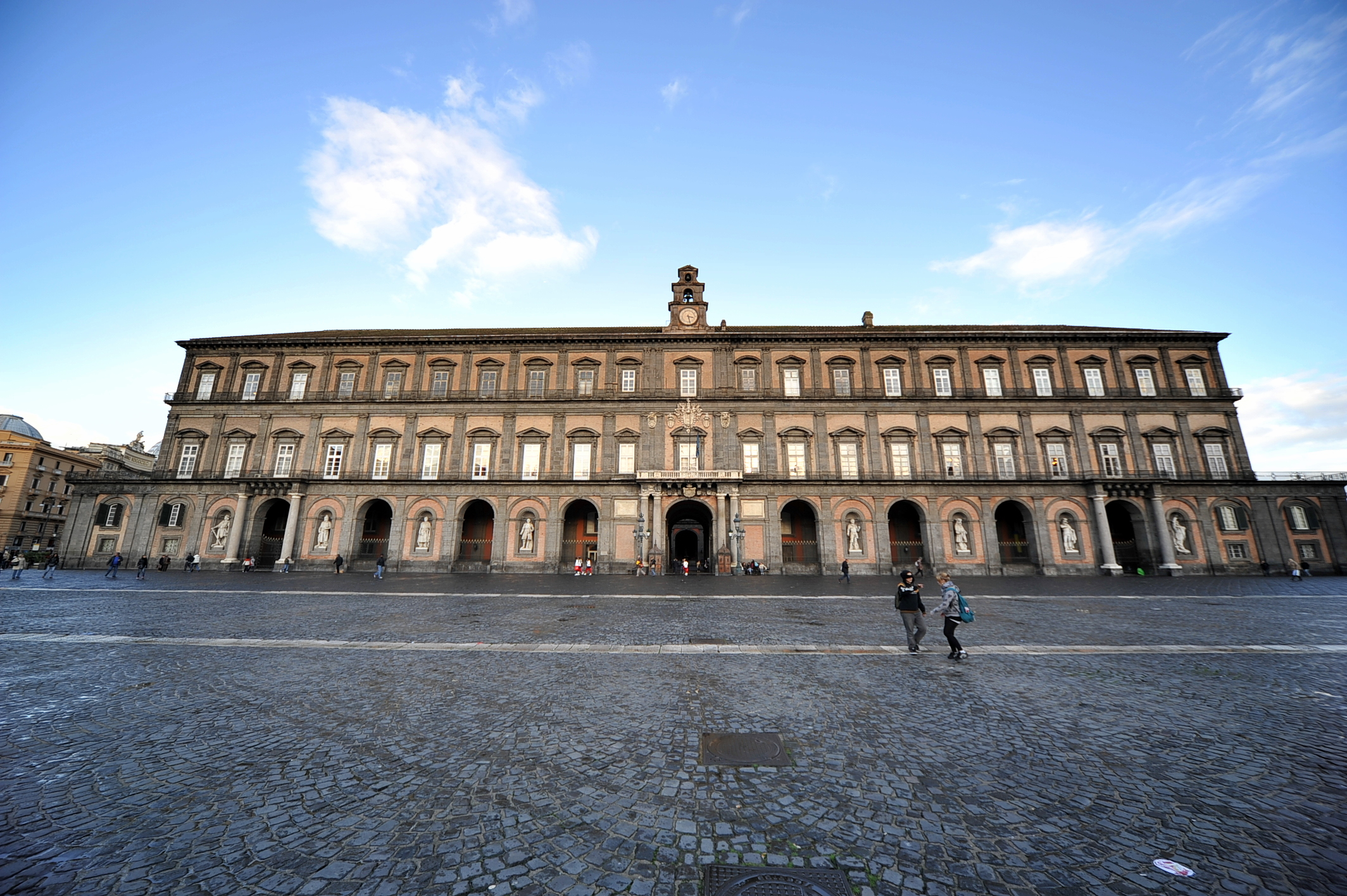 Palazzo Reale di Napoli